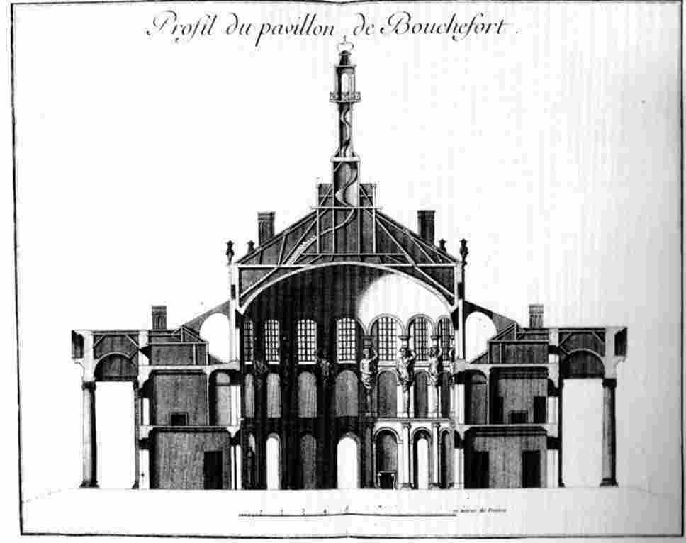 Schnitt durch Schloss Bouchefort